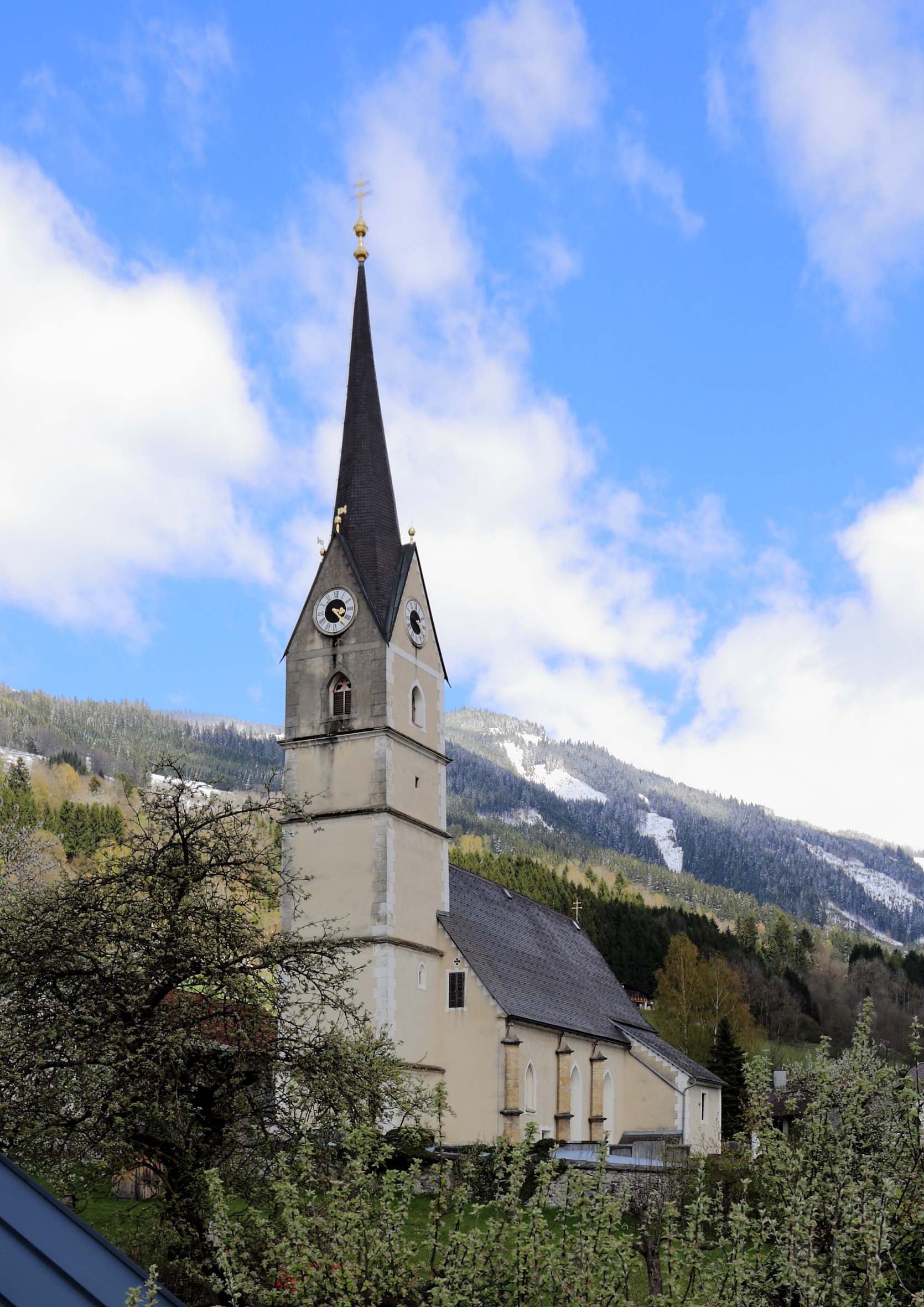 Die katholische Pfarrkirche Hl. Dreifaltigkeit der steiermärkischen Marktgemeinde Gaishorn am See.